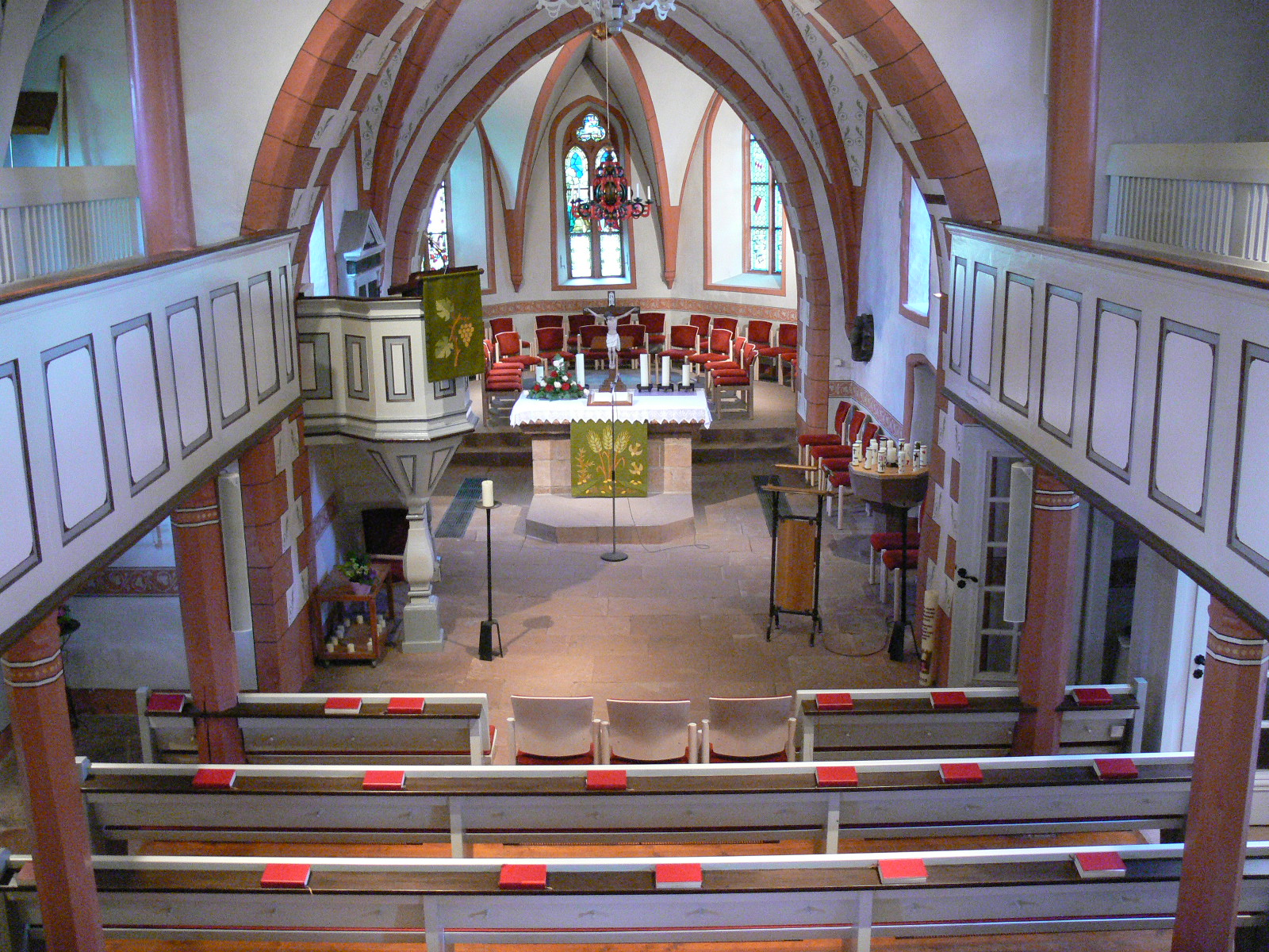 Blick von der Empore in den Innenraum der ev. Kirche Fronhausen